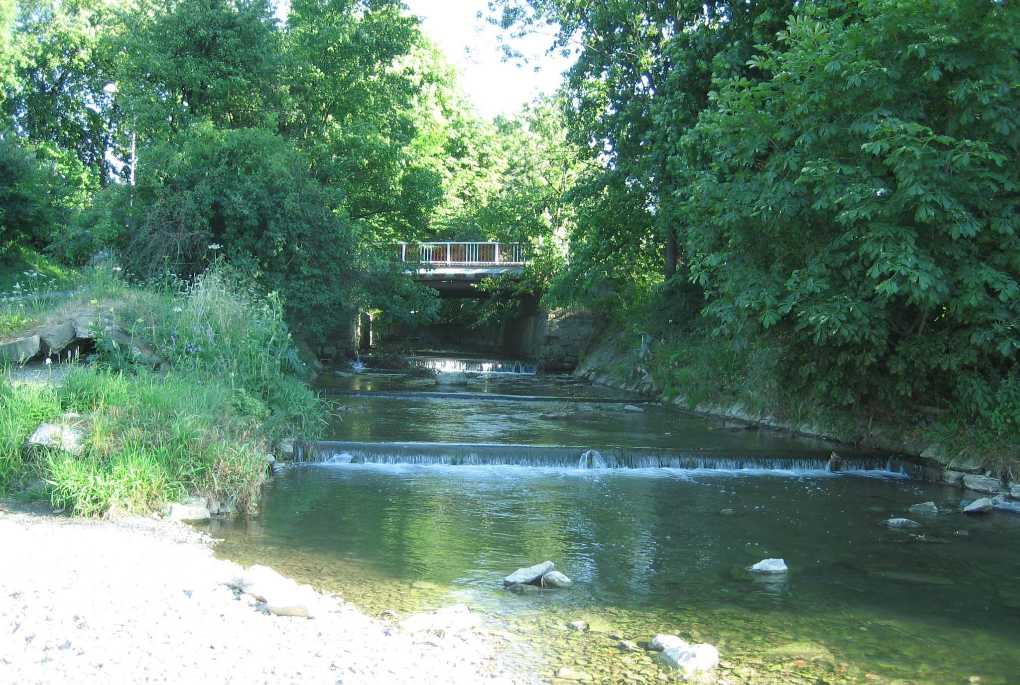 Rokytenka přítok Vsetínské Bečvy